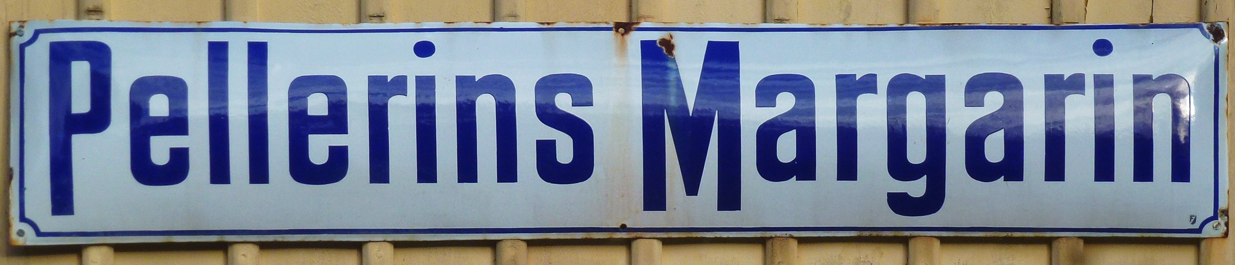 Pellerins Margerin emaljskylt